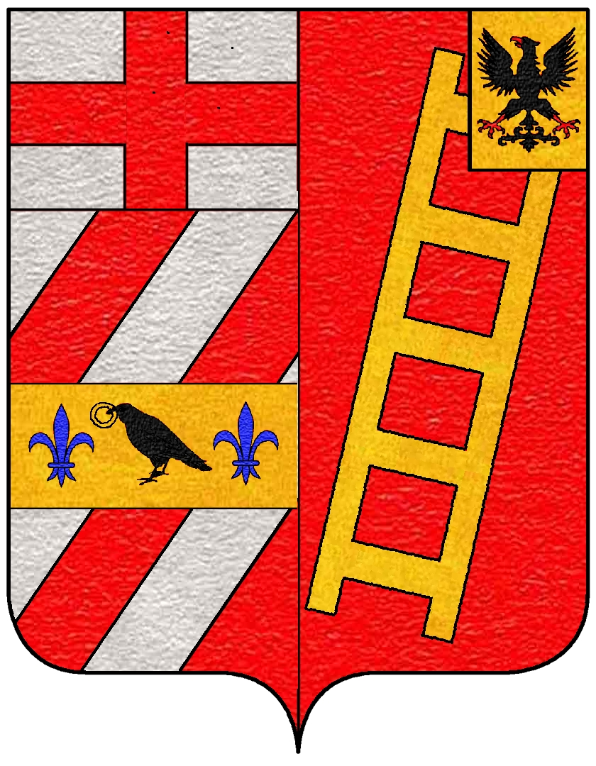 Stemma della famiglia Giorgi-Bona